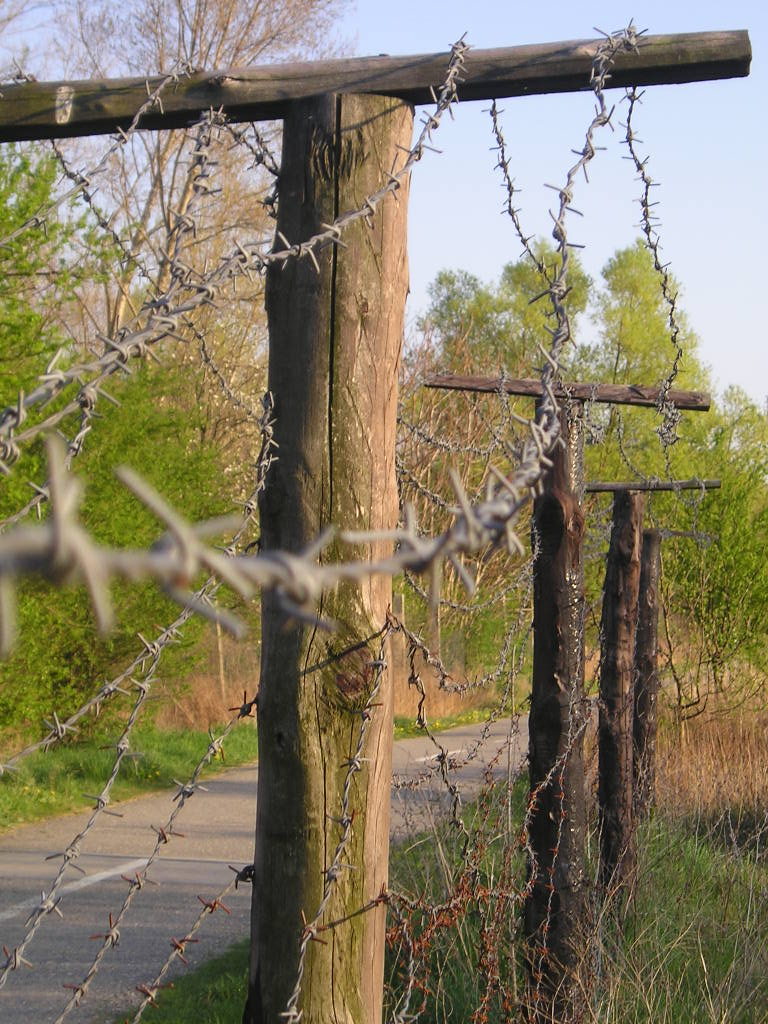 Železná opona, Bratislava-Devínska Nová Ves, slovensko-rakúska hranica